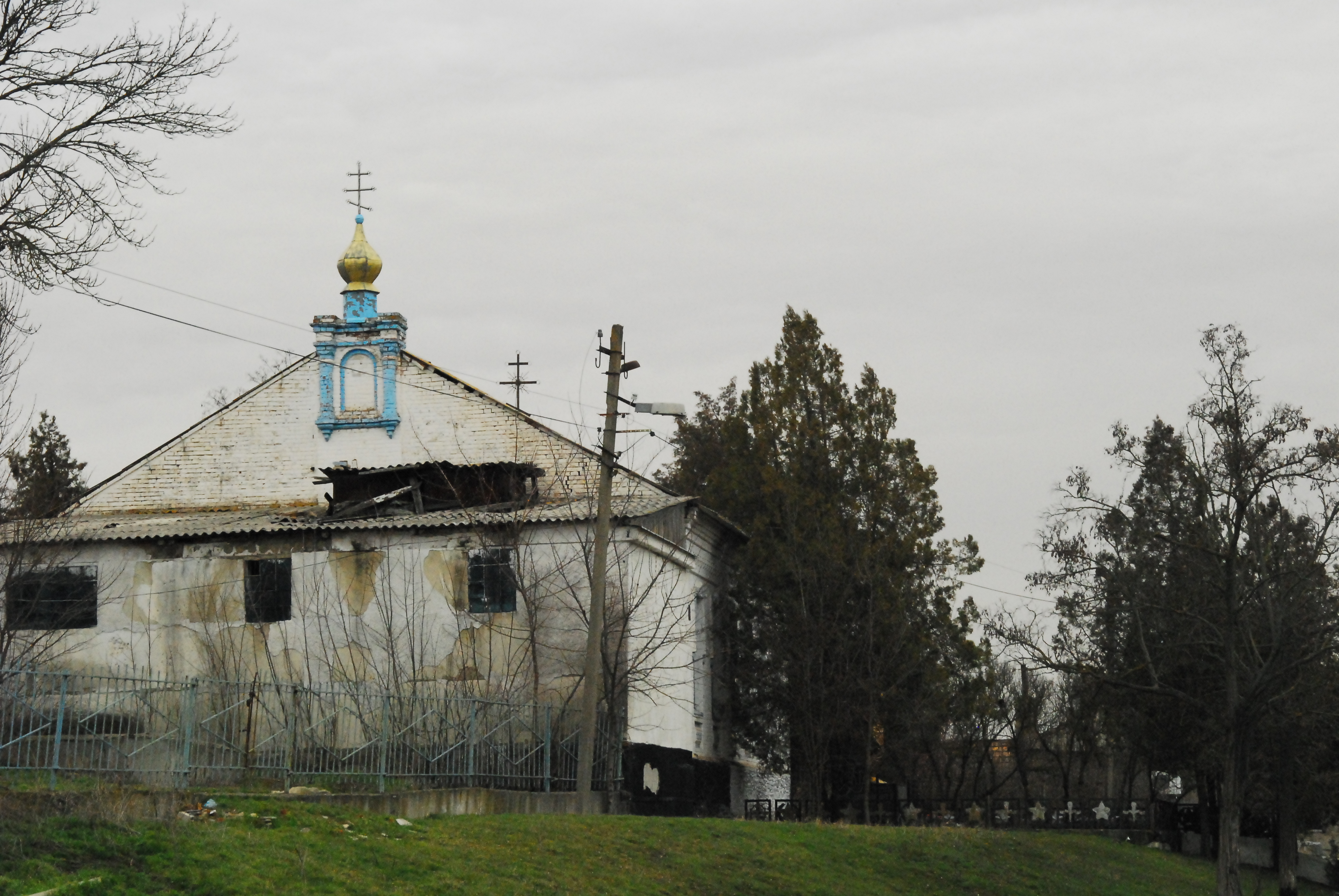 Тамбовка (Запорожская область)